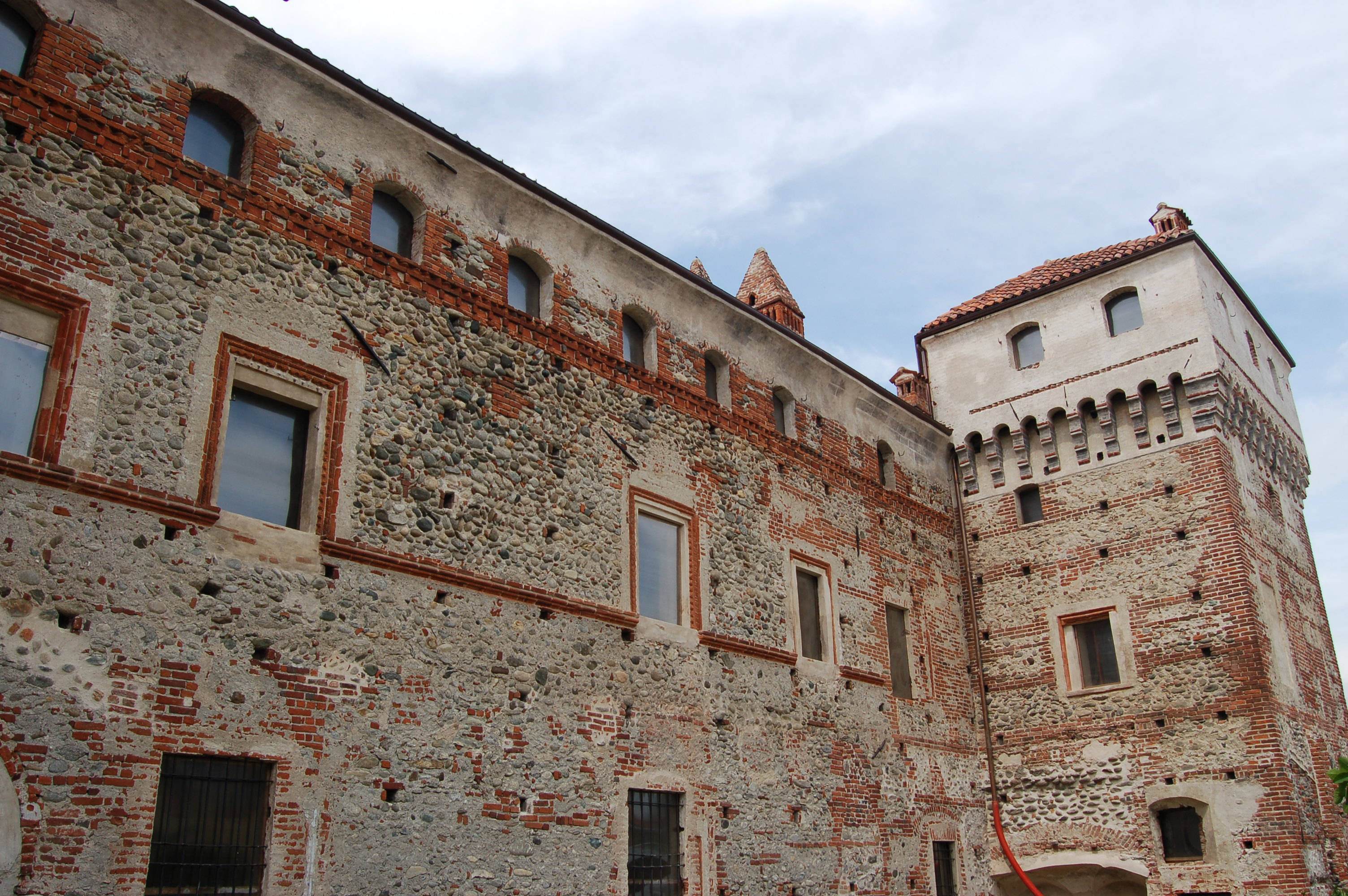 CASTELLO DI OZEGNA VISTA DELLA MANICA NORD-SUD CON LA TORRE DI NORD-EST